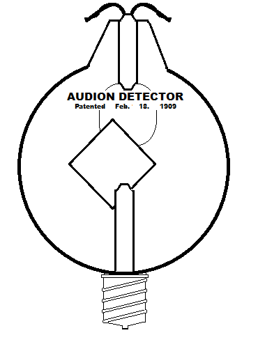 Zeichnung einer frühen Audion-Röhre von 1909